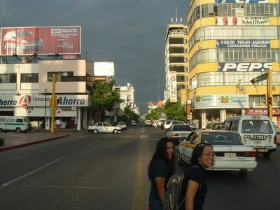 Avenida Central